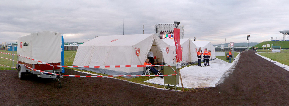 Unfallhilfsstelle (UHS) des Malteser Hilfsdienstes auf dem Marienfeld bei Köln, Weltjugendtag 2005.Die Hilfsstelle konnte mit gut 20 Helfern in drei Zelten zwei Schwer- und acht Leichtverletzte/-Erkrankte gleichzeitig versorgen. Der Einzugsbereich umfasste ein Gelände mit mehreren zehntausend Besuchern. Vorne ein Halteplatz für Rettungs- und Versorgungsfahrzeuge. Etwa 20 solcher standardisierter Hilfsstellen waren auf dem Marienfeld in Betrieb.